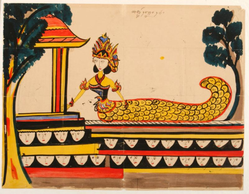 Aquarel. Vermoedelijk is deze schildering een ontwerp voor de uitgave van de Zending. Njai Blorong (verblindend en bont) is een vrouw in de vorm van een zeemeermin, die rijkdom schenkt aan mensen die haar vereren.. De Javaanse godin Njai Blorong